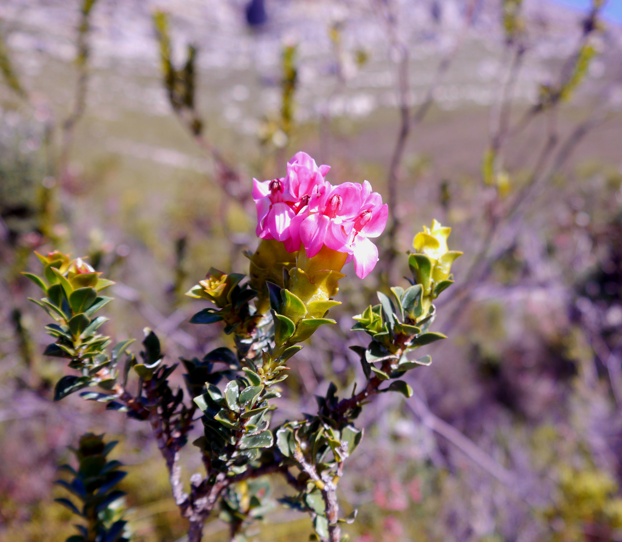 Saltera sarcocolla in Fernkloof Nature Reserve (Hermanus, South Africa).